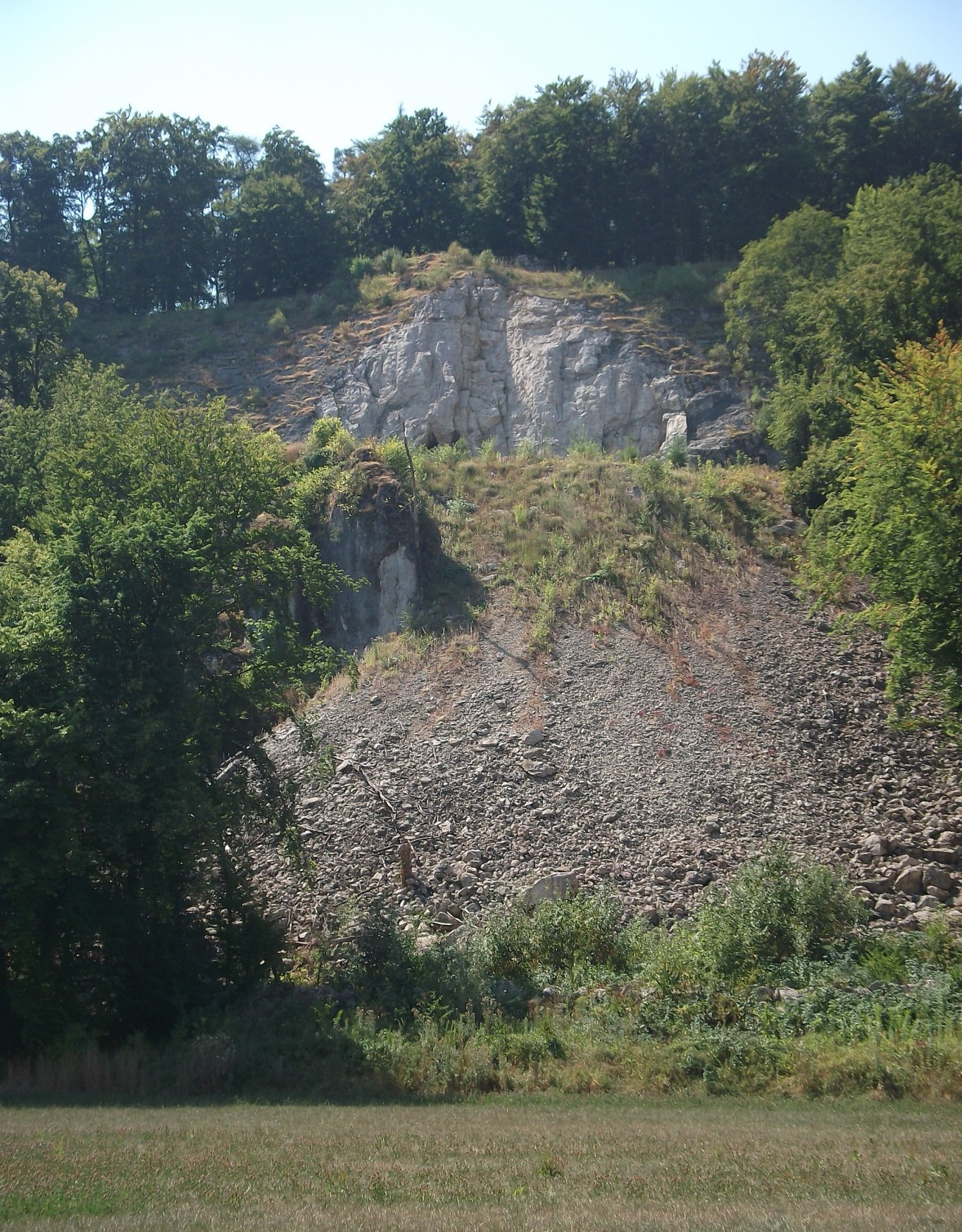 gesprengtes Felsentor bei Etterzhausen